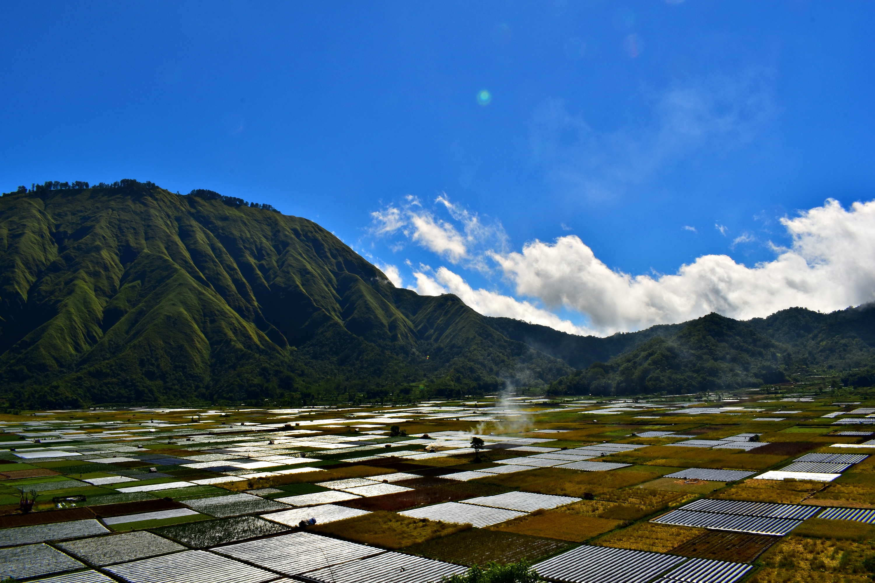 merupakan bukit yang berada di kawasan desa adat bukit selong dimana jika sudah sampai diatas bukit maka kita dapat melihat petak sawah warga.